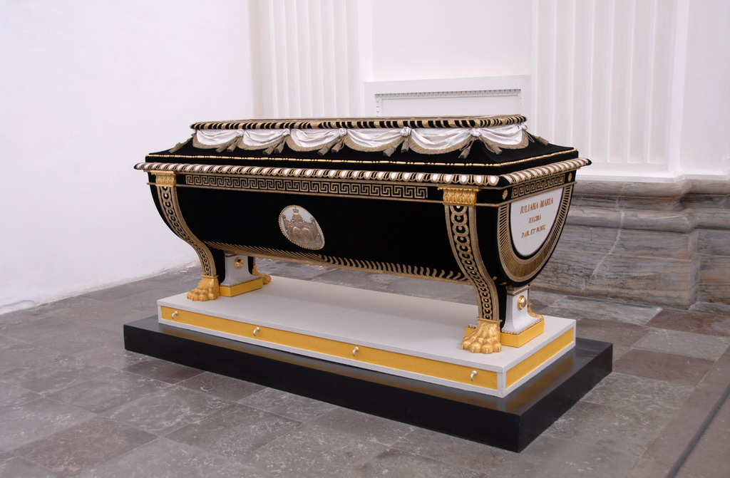 Tombe van Juliana Maria van Brunswijk-Wolfenbüttel. Zij was de tweede echtgenote van Frederik V en regentes tot 1784.